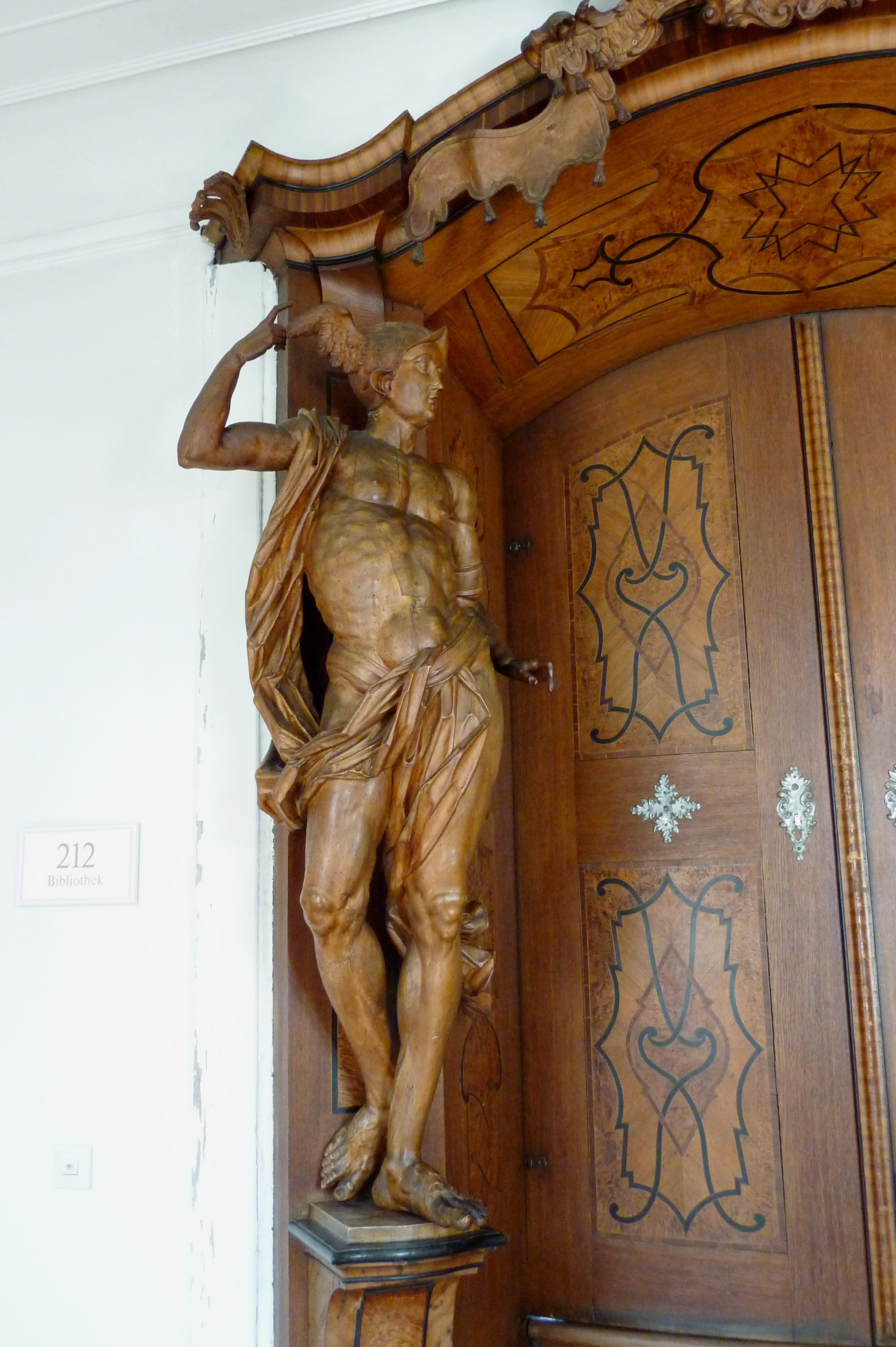 Ehemalige Universitätsbibliothek aus dem frühen 18. Jahrhundert, in der Akademie für Lehrerfortbildung und Personalführung in Bayern in Dillingen an der Donau (Bayern), holzgeschnitzte Tür mit Skulpturen von Johann Georg Bschorer (1692–1763), Darstellung: Merkur